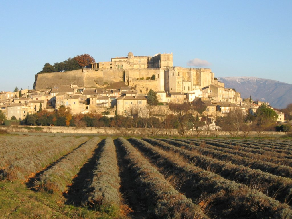 La ville de Grignan (Vaucluse, France)